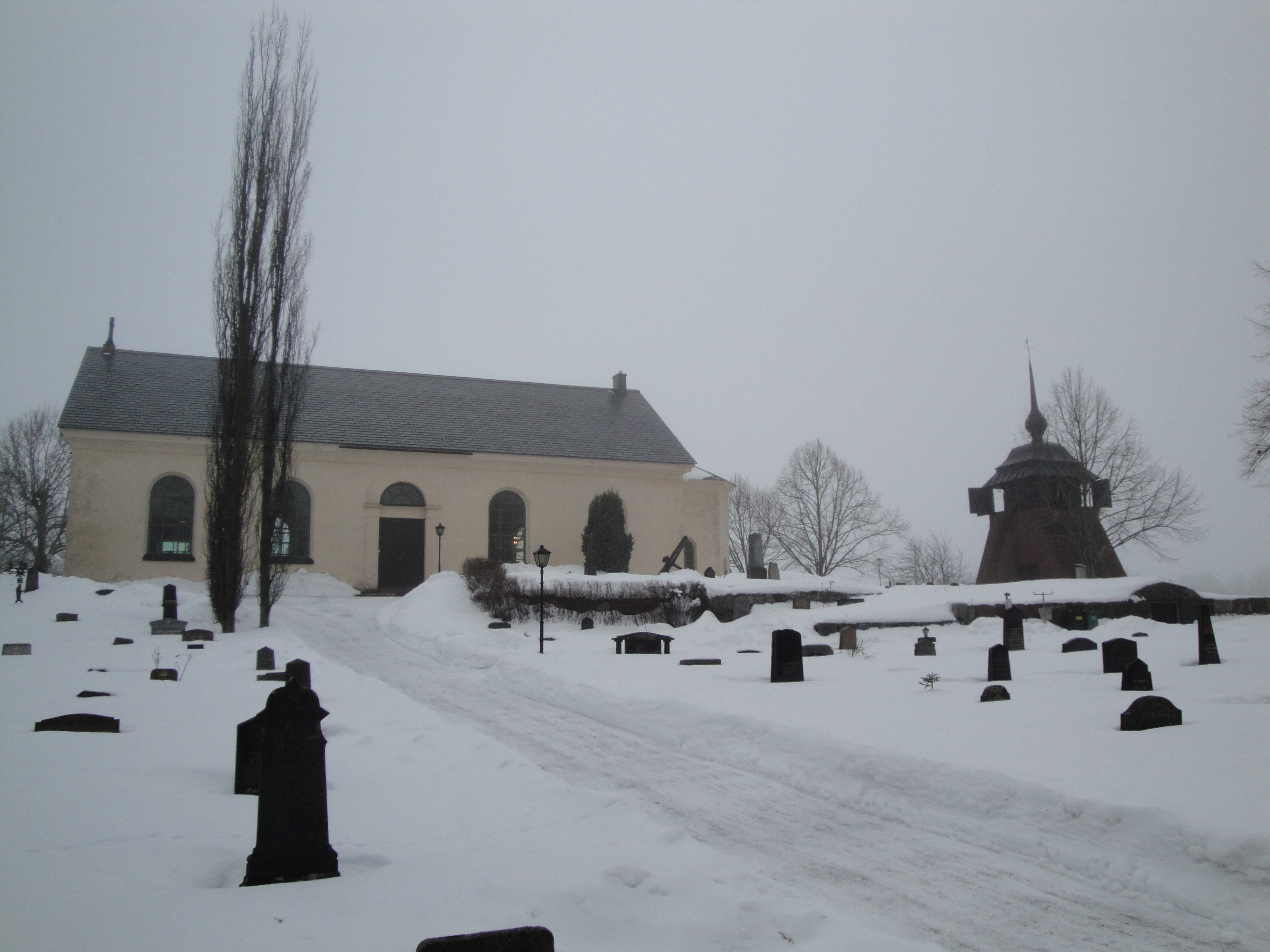 Blidö kyrka med klockstapeln, östra sidan.